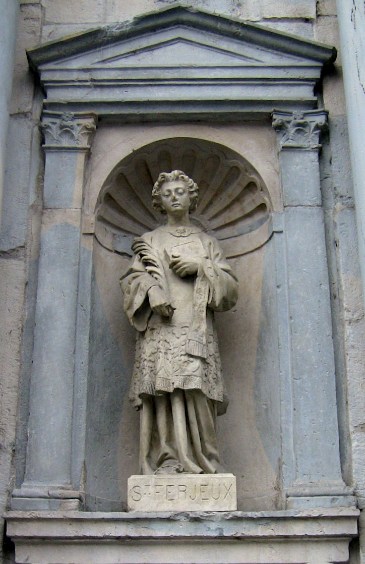 Statue de Saint-Ferjeuxn sur léglise Notre-Dame de Besançon (Doubs, France).